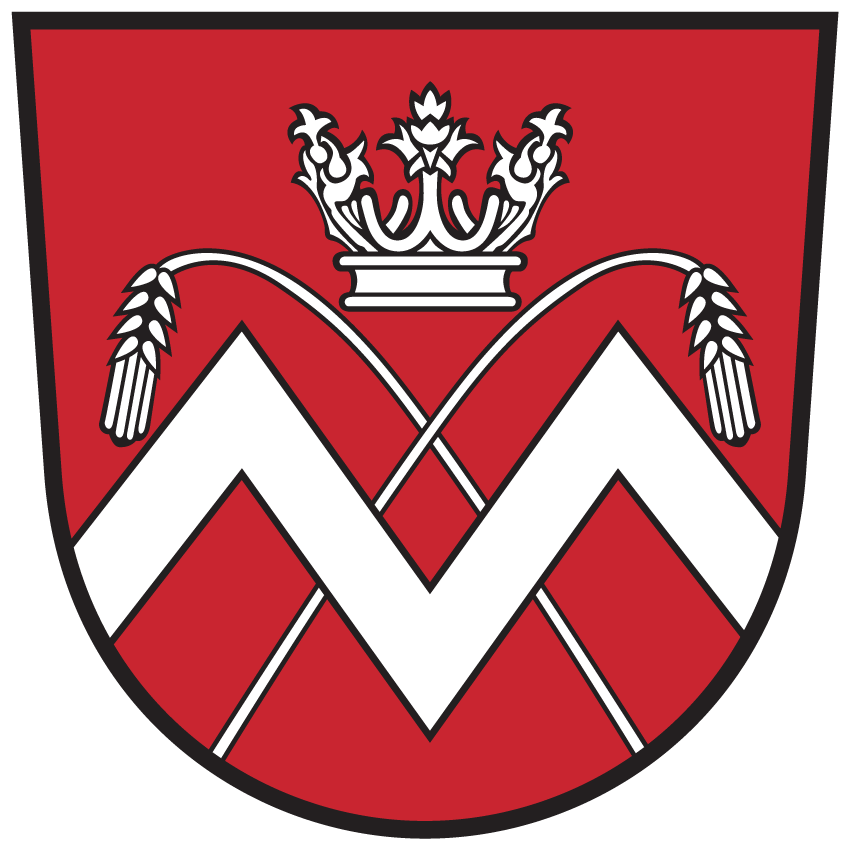 "In Rot ein aus einem erniedrigten silbernen Doppelsparen gebildetes M, unterlegt von zwei sich kreuzenden und unter dem Schildhaupt nach außen geneigten silbernen Ähren, überhöht von einer silbernen Krone“ Erklärung: Das Wappen der Gemeinde Maria Rain beinhaltet vier Symbole der Gemeinde. Die Türme der Marien-Wallfahrtskirche, die beiden Spitzen weisen zugleich auch auf das „M“ im Gemeindenamen „Maria Rain“ hin, die beiden Ähren als Symbol für die Landwirtschaft und die Marienkrone mit dem Winzermessern des Dietrichstein-Wappens, die am Hauptaltar der Maria Rain Wallfahrtskirche 1694 angebracht wurden.